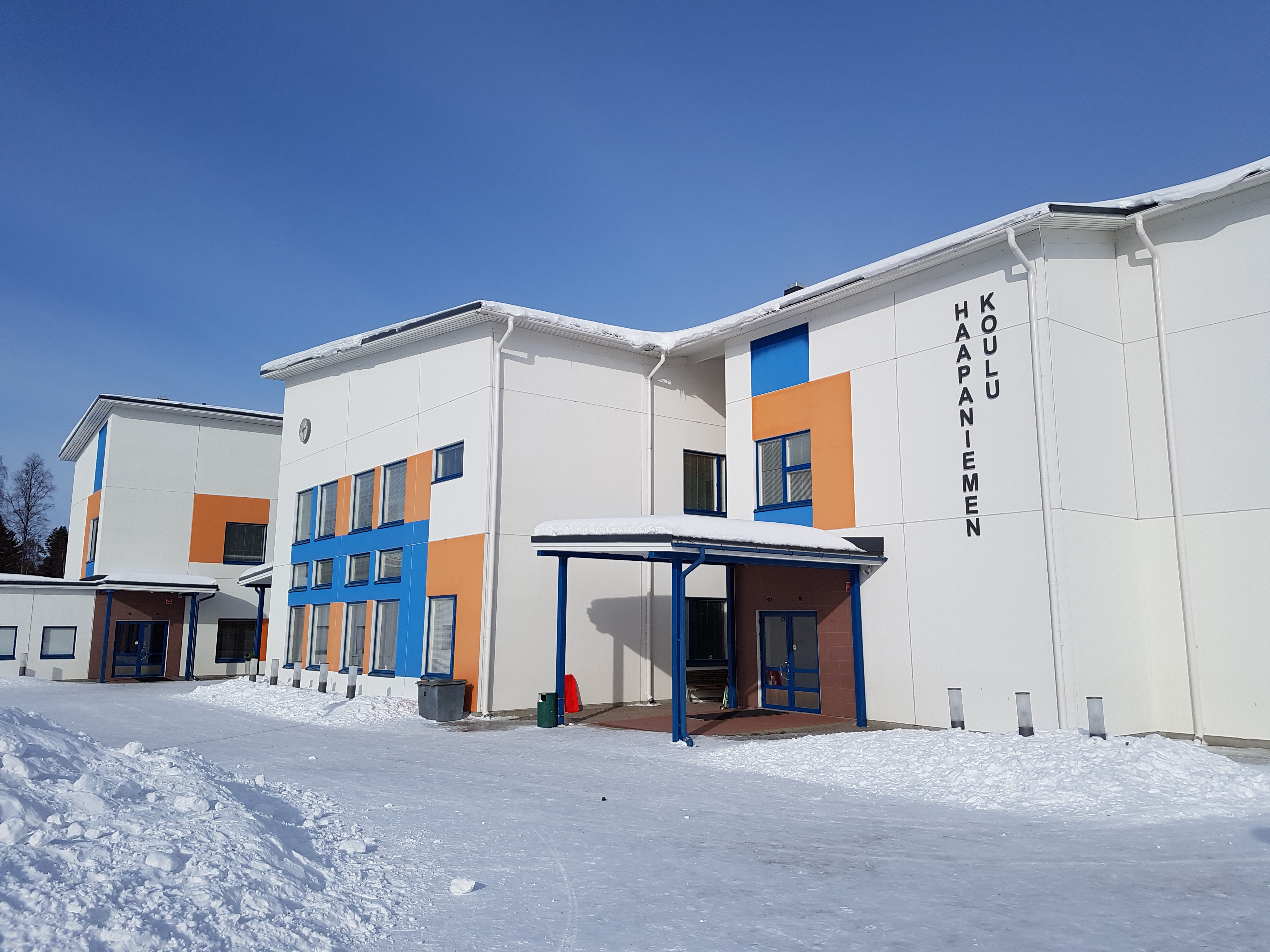 Viitasaaren Haapaniemen koulun alaluokkien rakennuksen pääsisäänkäynnin puoleinen julkisivu talvella.